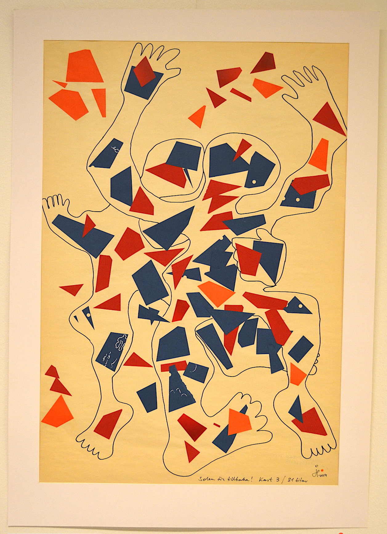 The sun is back - 81 bits